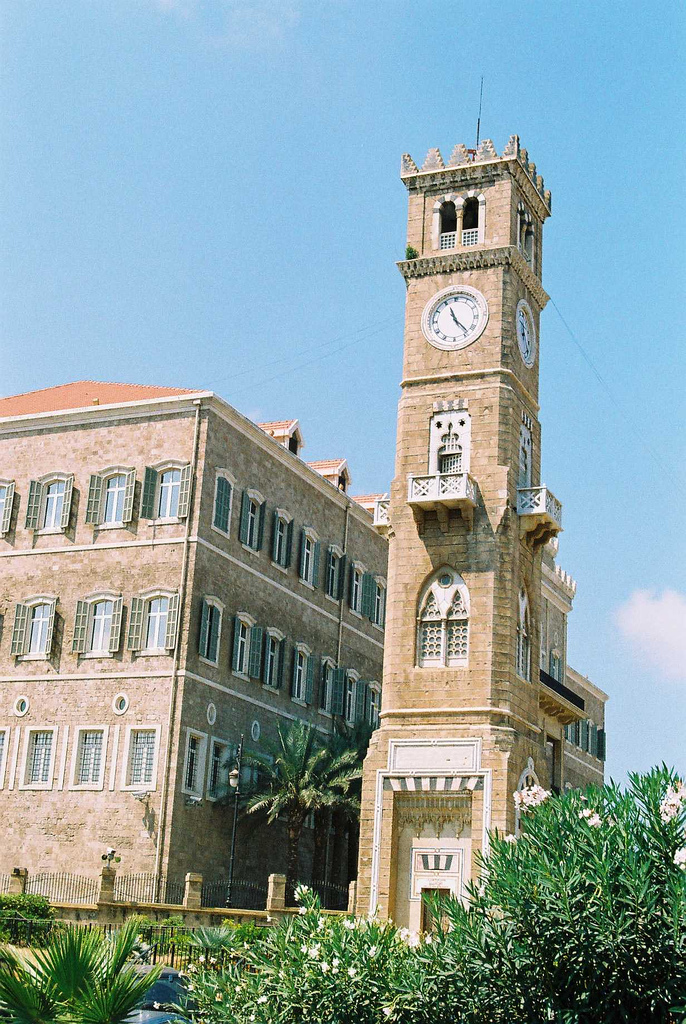 Beirut / Libanon 2003